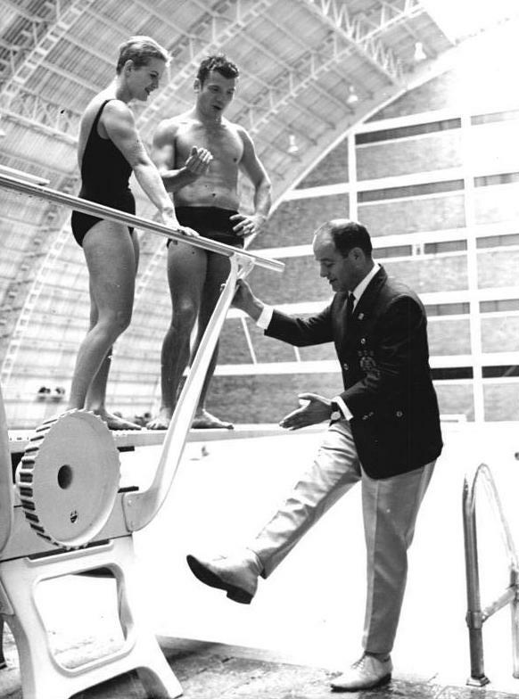 Zentralbild/Koch 3.10.1968 Mexiko-Stadt: Vorbereitung XIX Olympische Sommerspiele vom 12. bis 27.10.1968 DDR-Trainer Max Kienast (rechts) zeigt hier seinen beiden Schützlingen Ingrid Gulbin und Rolf Sperling die richtige Fußhaltung beim Wasserspringen.